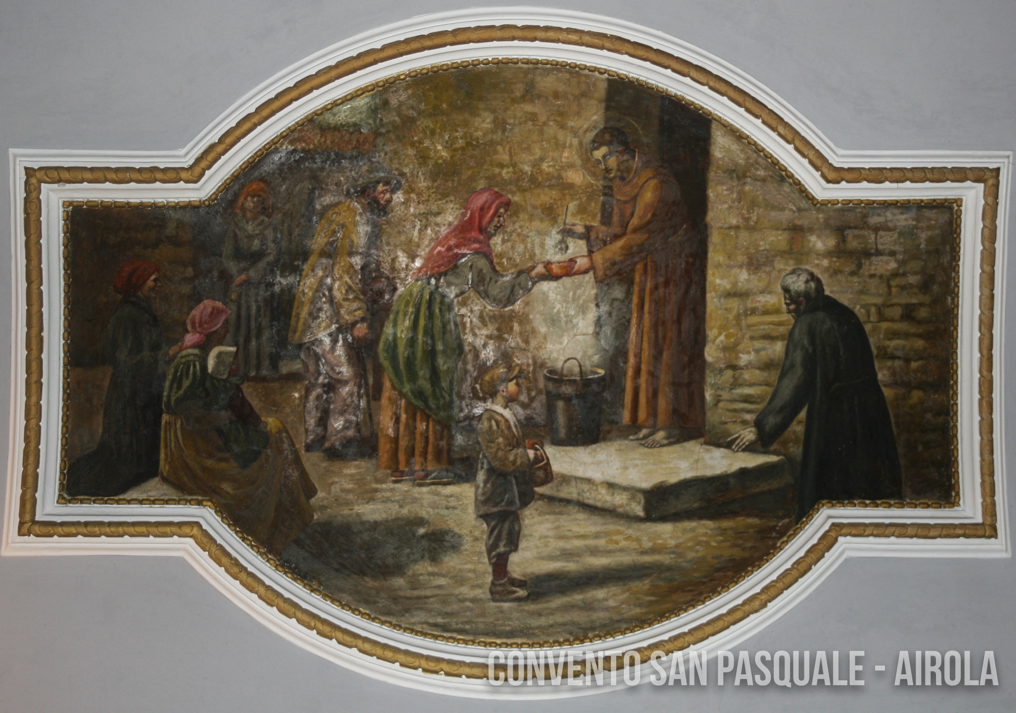 Chiesa SS. Concezione - Airola (BN)